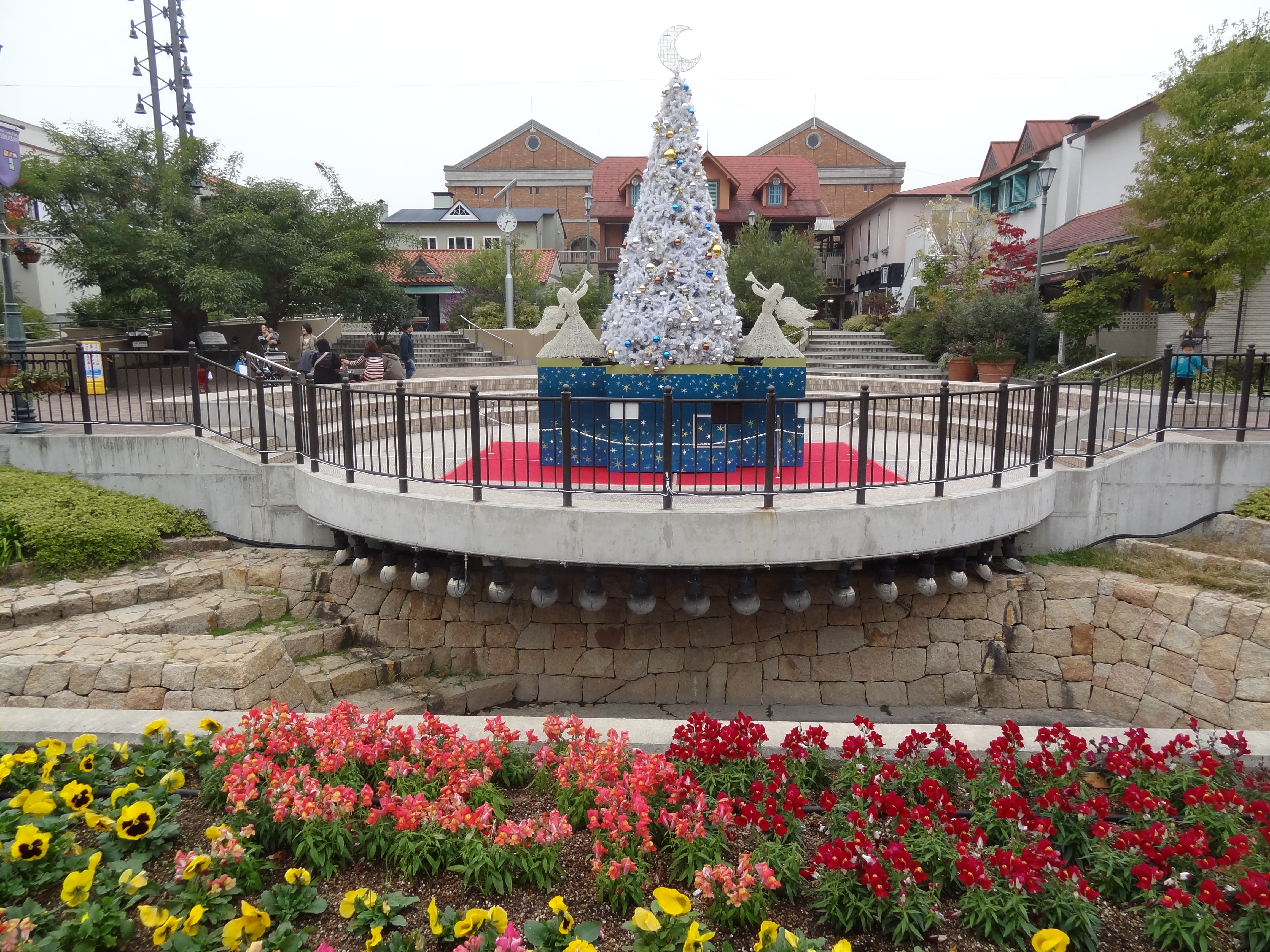 つかしん カリヨンガーデン（クリスマスツリー設置時）